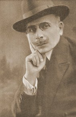 Фотопортрет Аршака Фетваджяна